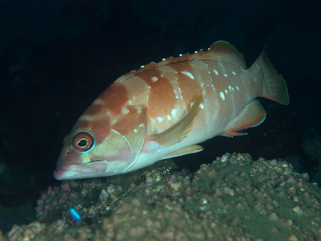 アカハタ Epinephelus fasciatus